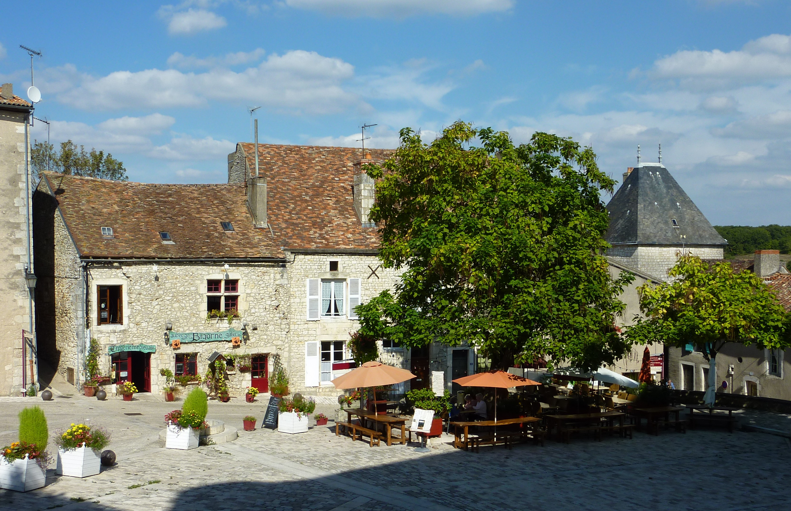 Place du donjon, cité médiévale de Chauvigny (Vienne, France)